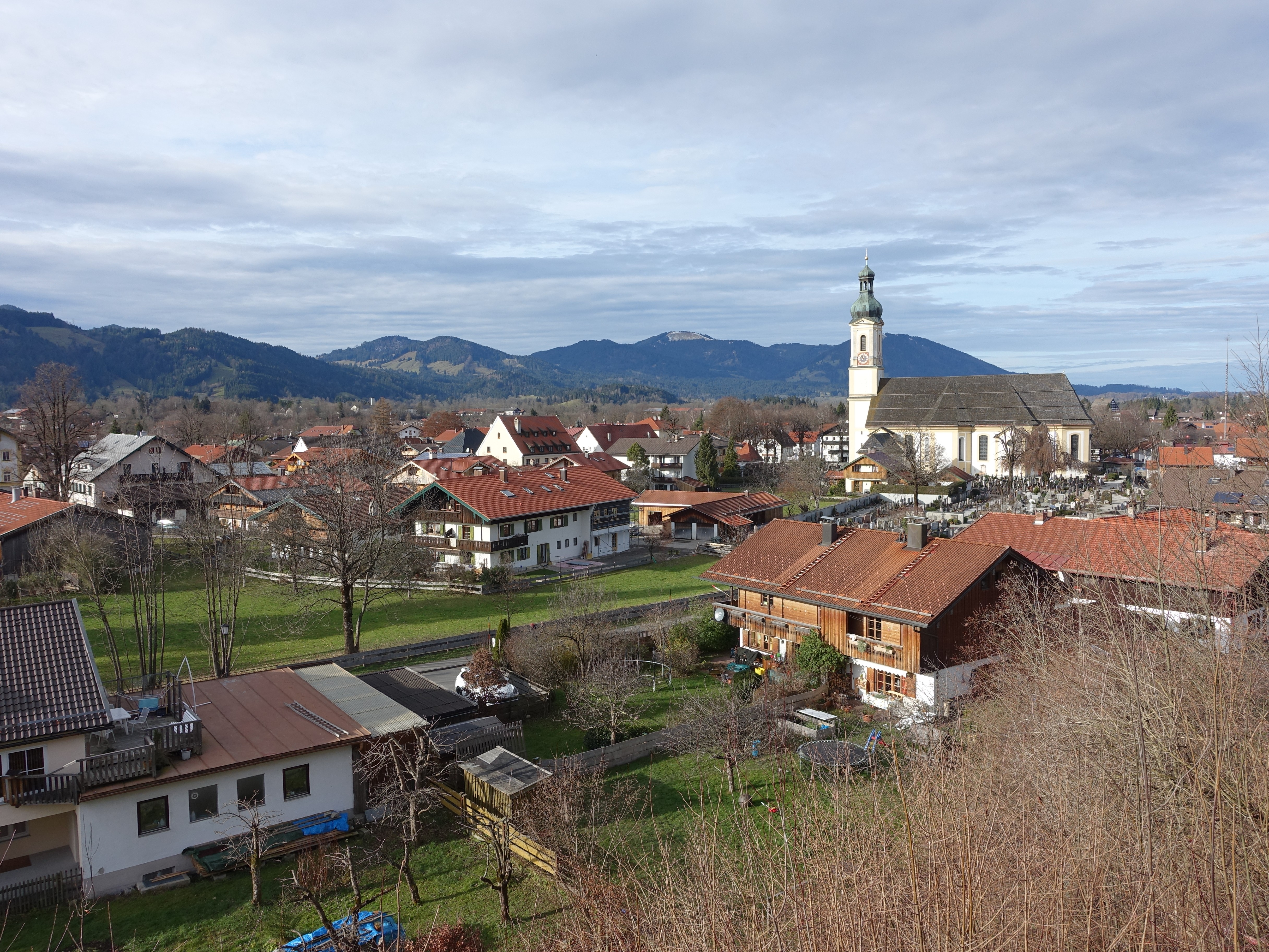 Lenggries - Sicht auf Kirche St. Jakob